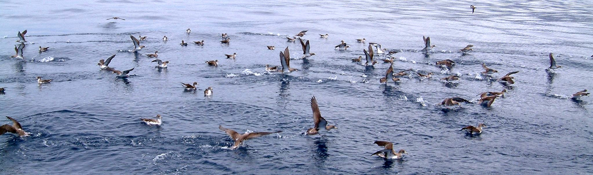 Madeira_Funchal Hafen Gelbschnabel Sturmtaucher. Photograph: Peggy